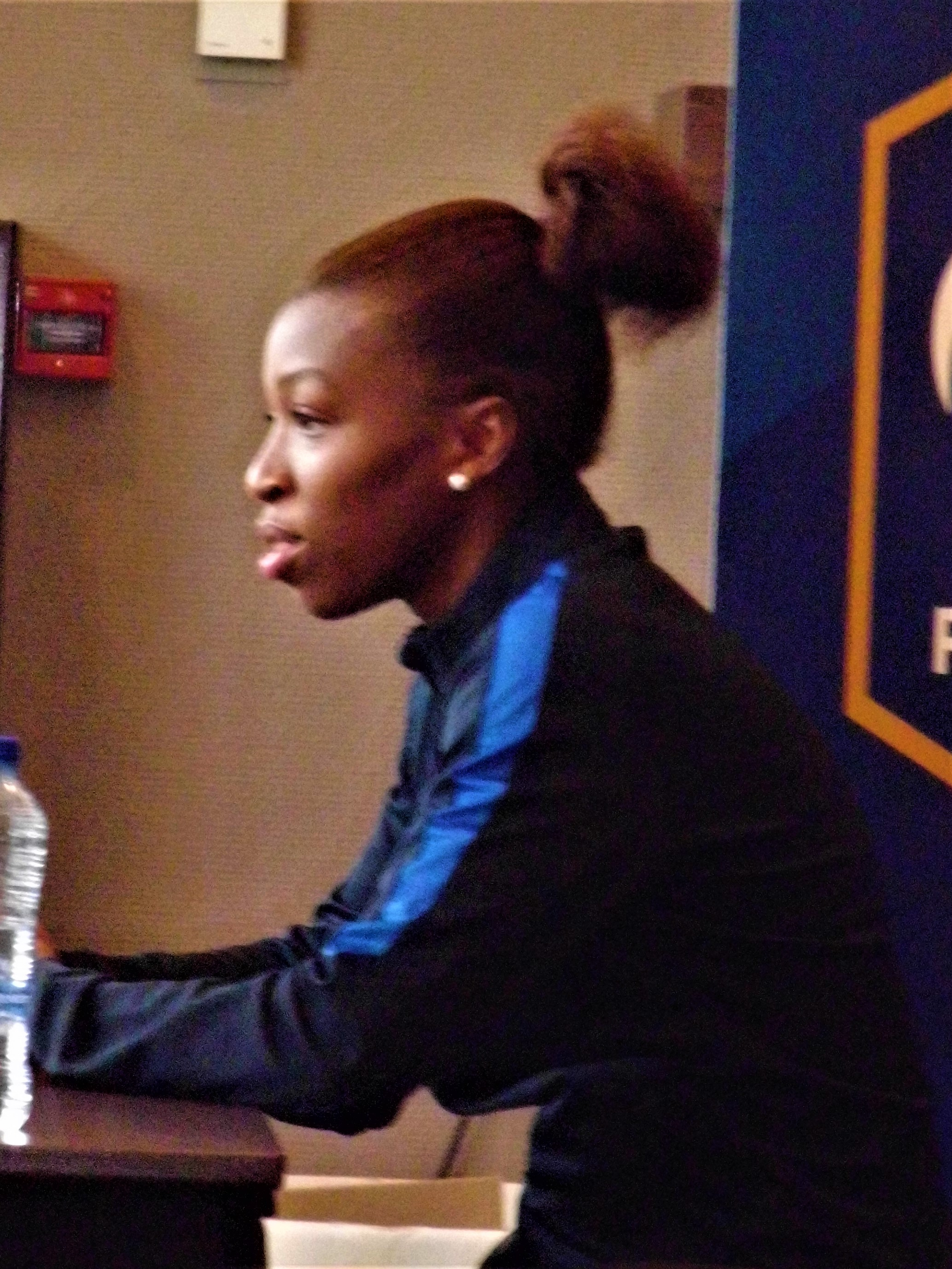 Onema Grace Geyoro im Gespräch mit einem Journalisten bei der EM 2017 im französischen Teamquartier